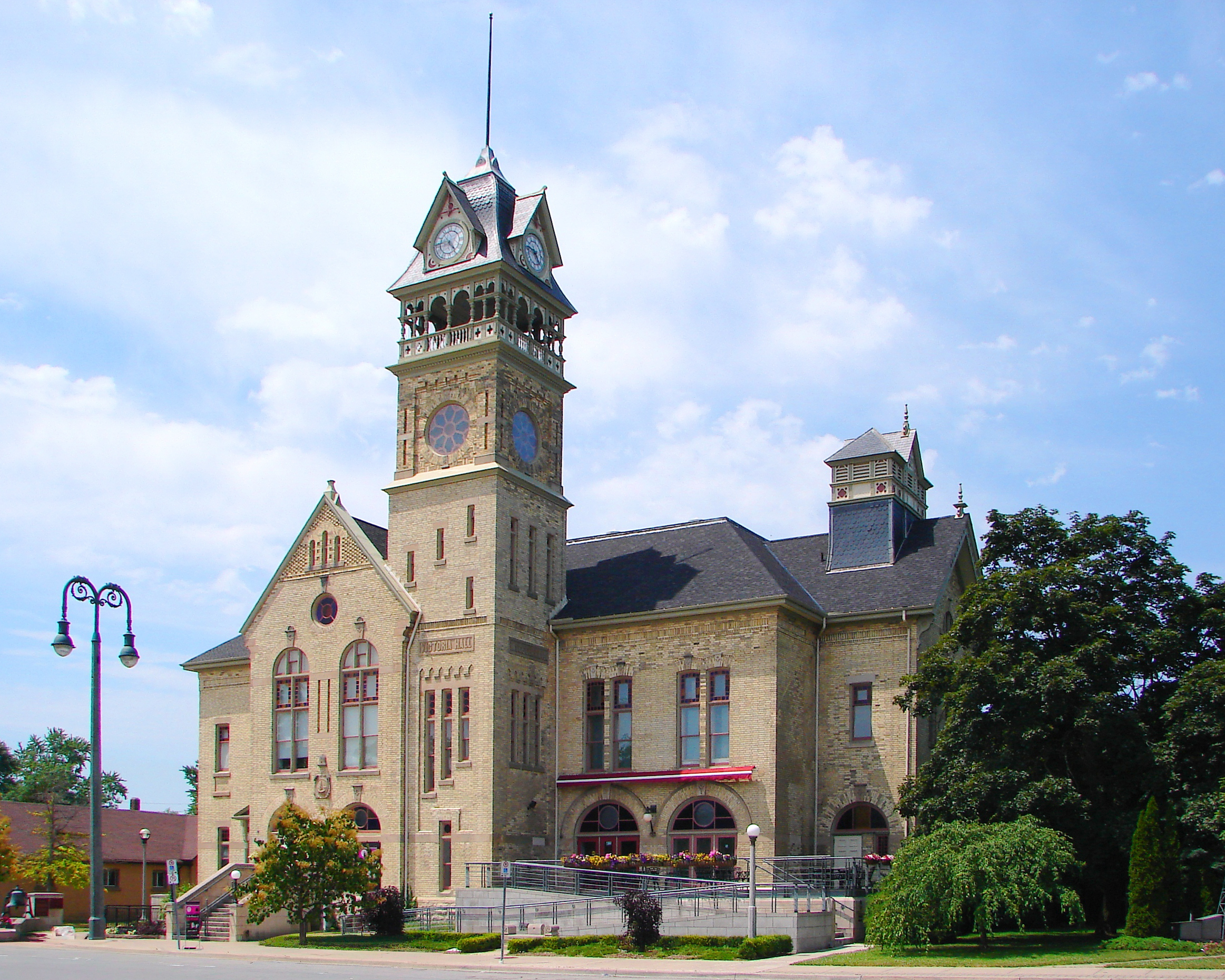 Petrolia, Ontario, Canada